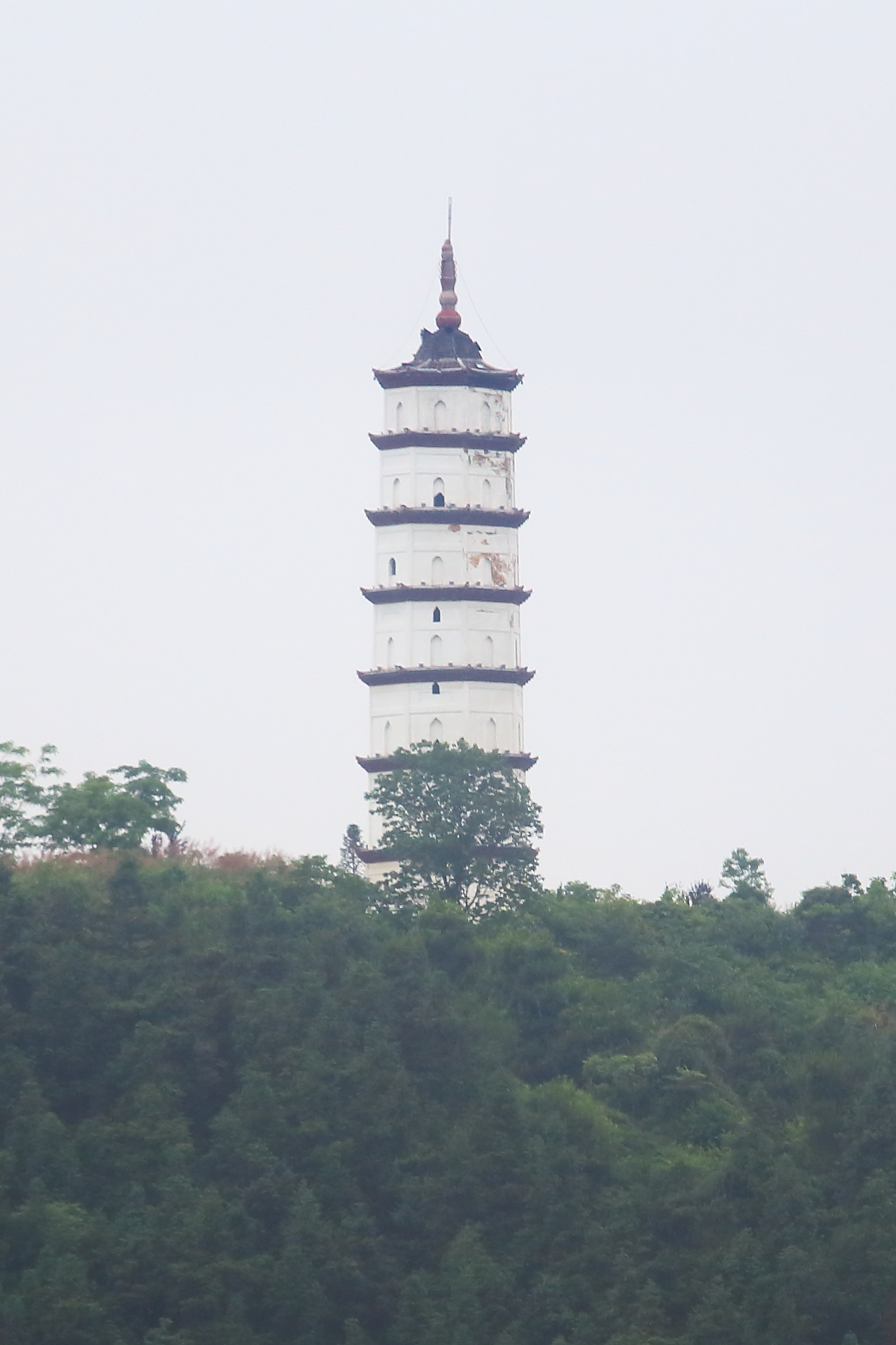 南城聚星塔